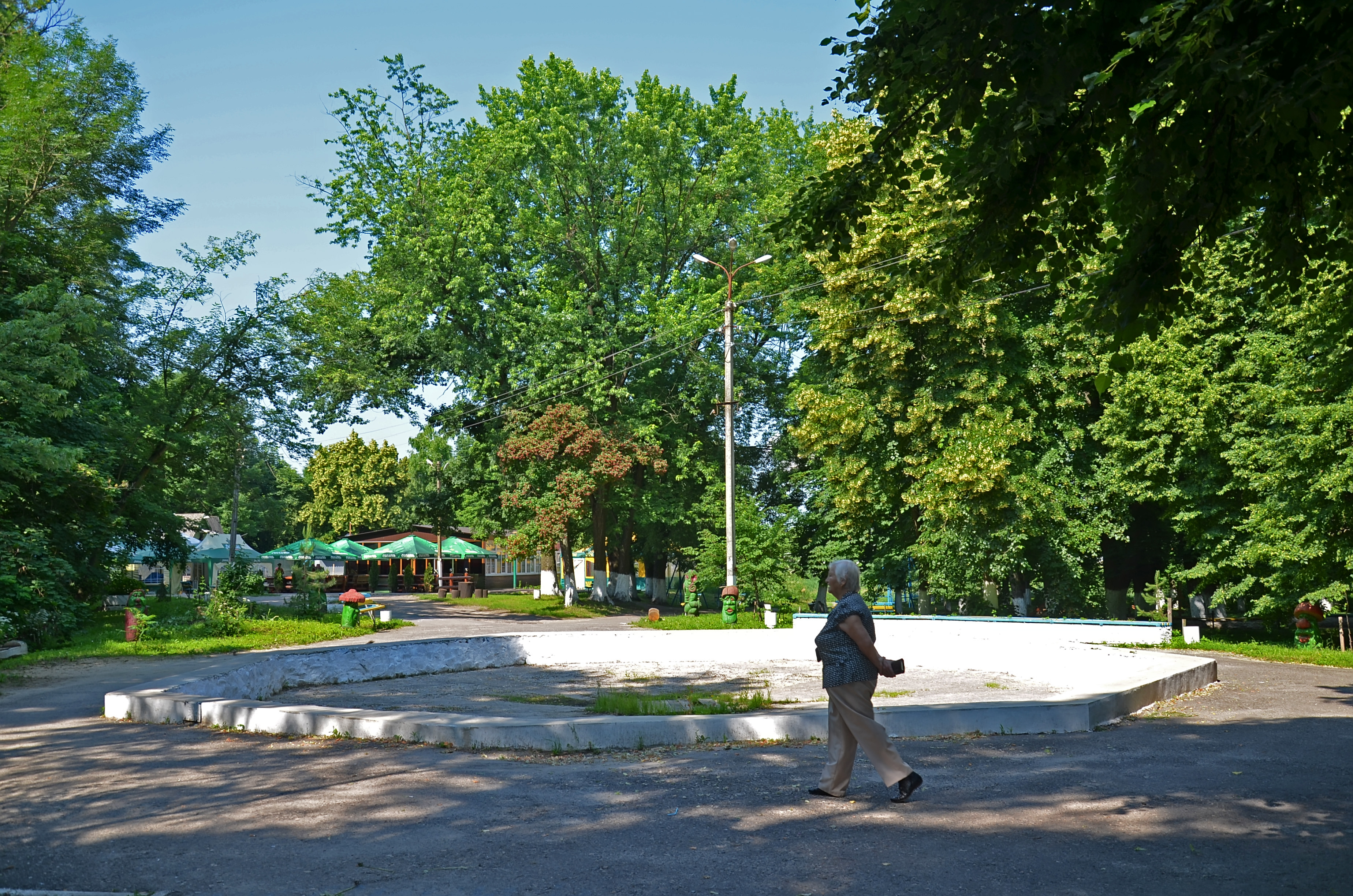 на лівому березі р. Здвиж